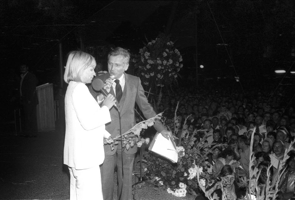 auf dem Rathausplatz. Im Bild Moderator Carlheinz Hollmann.